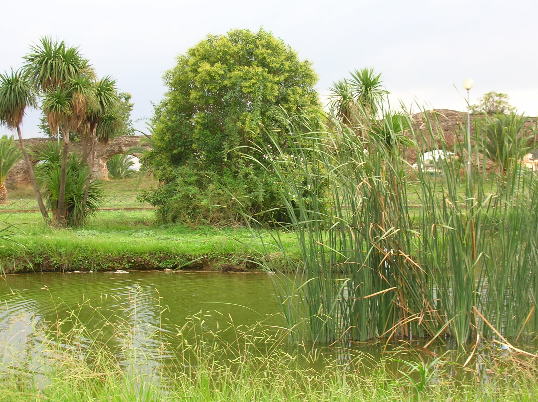 ParcoGiovanniPalatucci, Tor Tre Teste, Roma, Italia